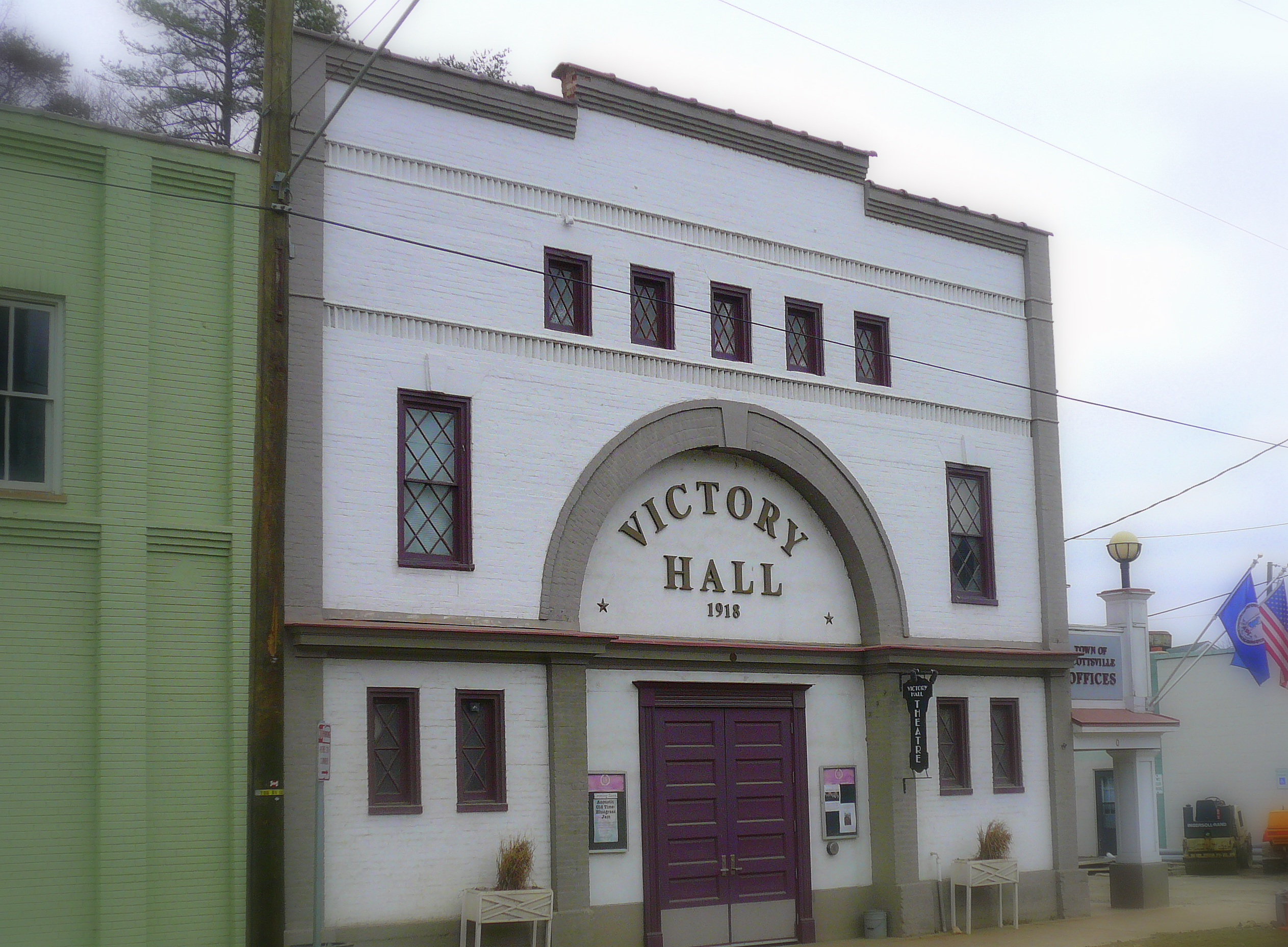 Scottsville Virginia